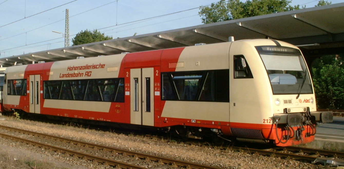 Regio-Shuttle der Hohenzollerischen Landesbahn in Tübingen